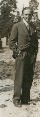 Eyvind Moestue, ca. 1930-1940